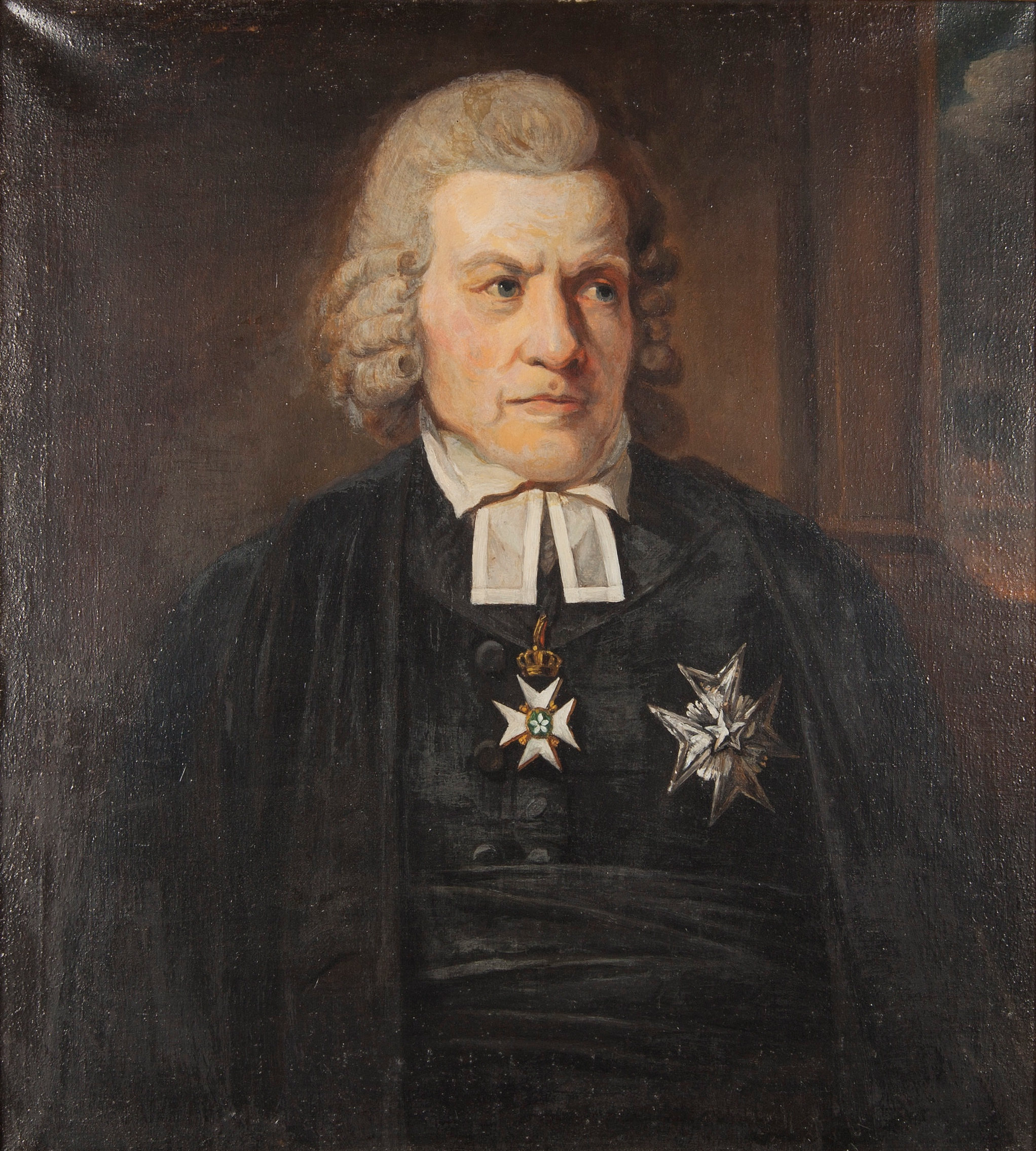 Biskopen och vetenskapsmannen Jakob Gadolin (1719-1802), iklädd prästrock med kommendörstecknet av Nordstjärneorden runt halsen och dess kraschan på bröstet. Avporträtterad av Carl Fredrik von Breda ca 1785.